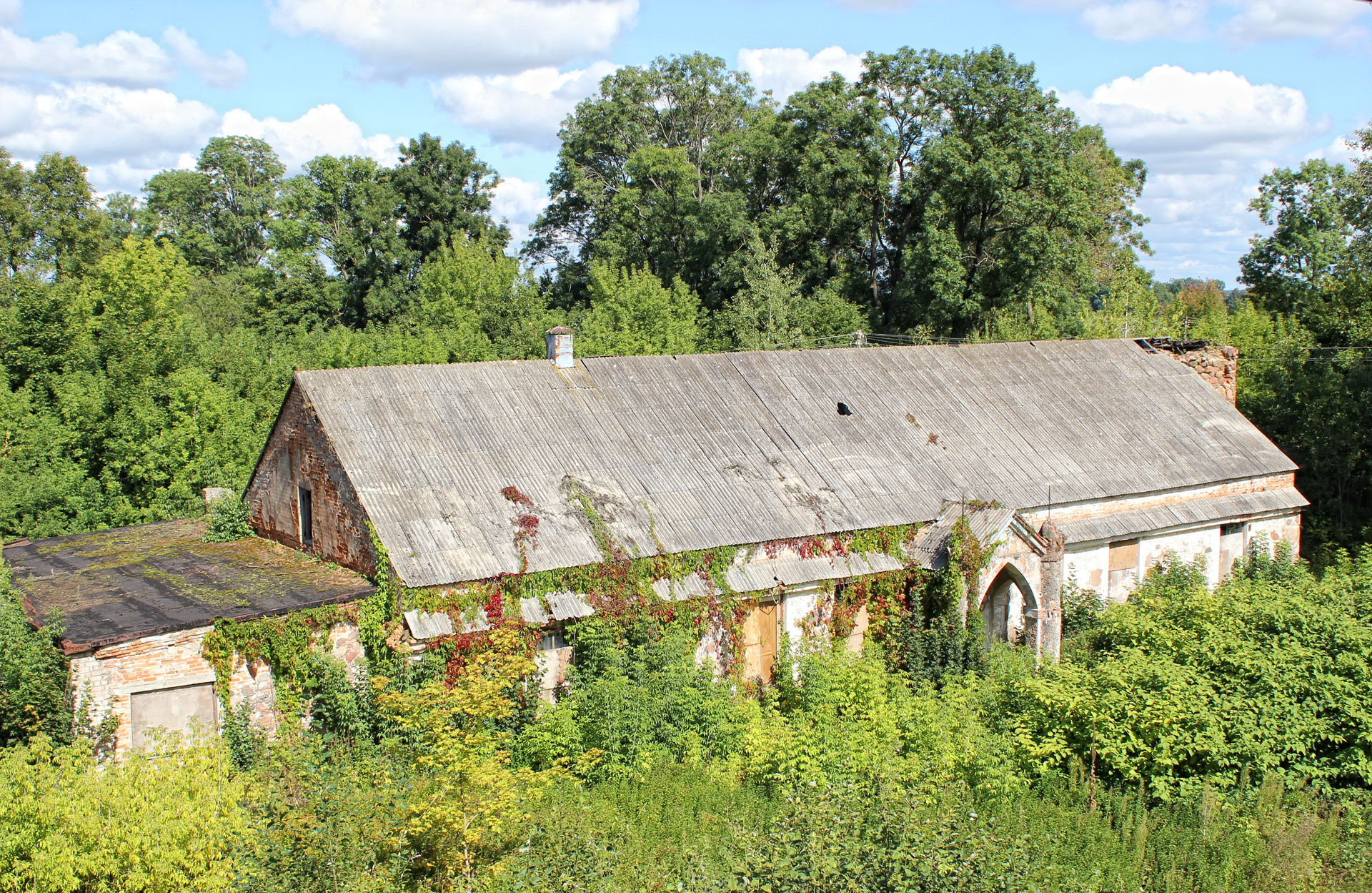 Беларуская (тарашкевіца): Комплекс былога палацу г.п. Жалудок This is a photo of Belarusian heritage monument. Reference number: 412Г000627 ( WLM)